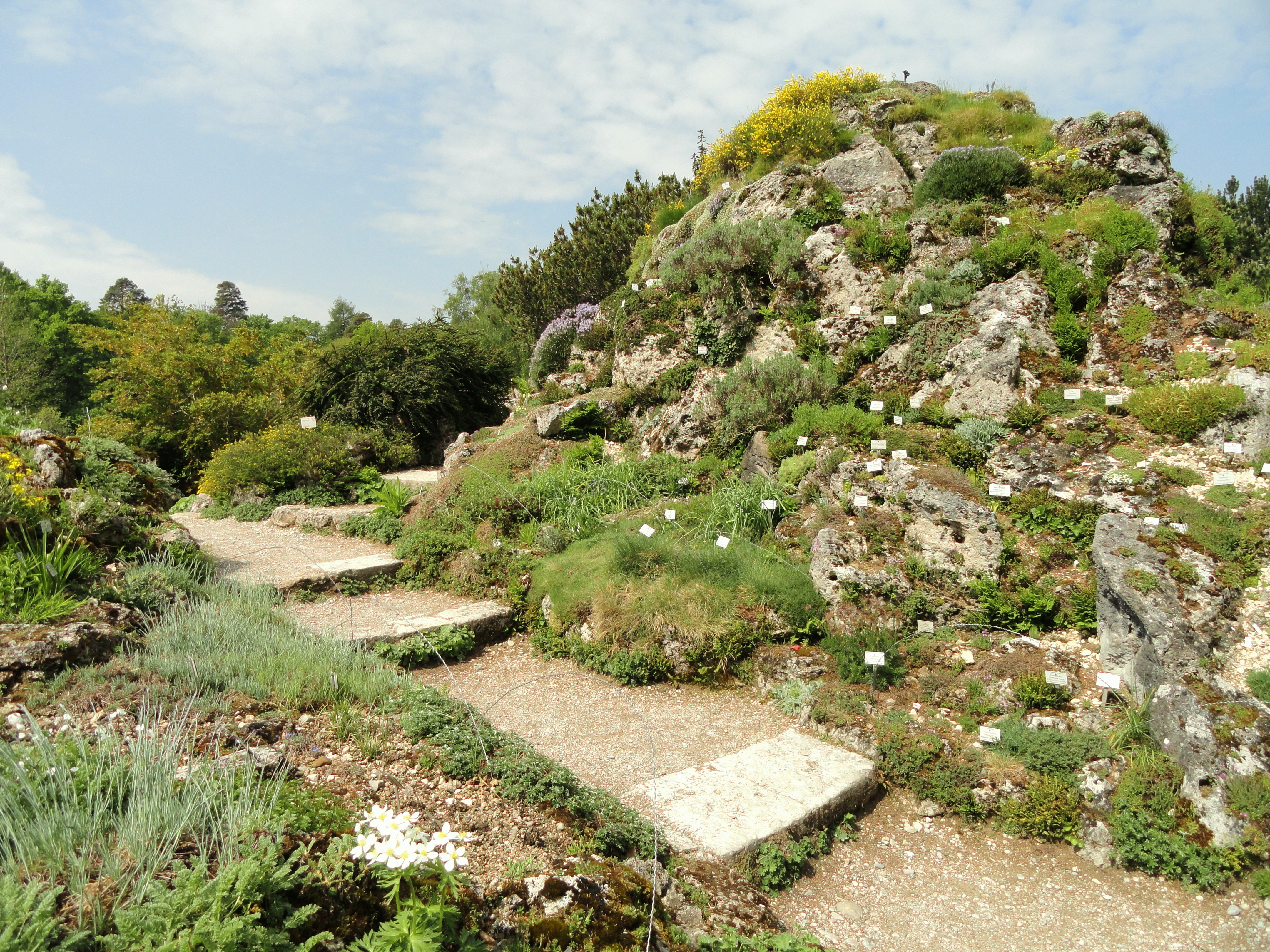 Alpine garden in the Botanischer Garten München-Nymphenburg, Munich, Germany.